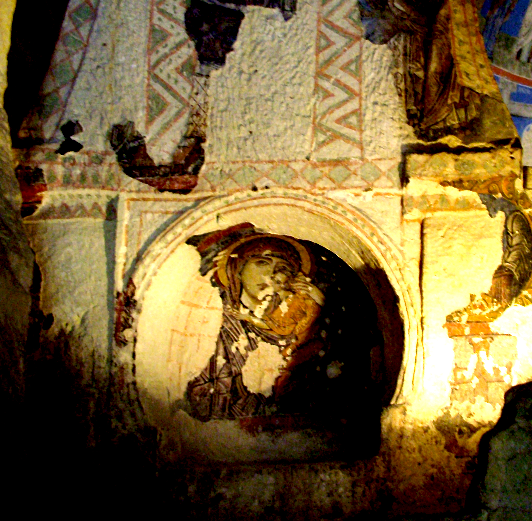 Kappadókia/Göreme Nemzeti Park: Tokali-templom (Tokali kilise) freskója